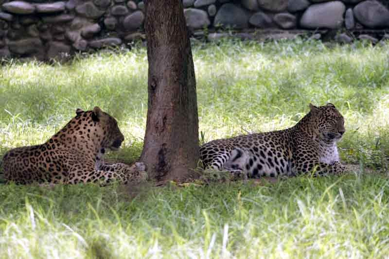 leopards